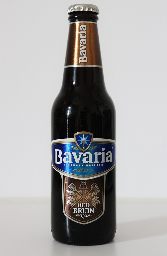 Bavaria Oud Bruin fles